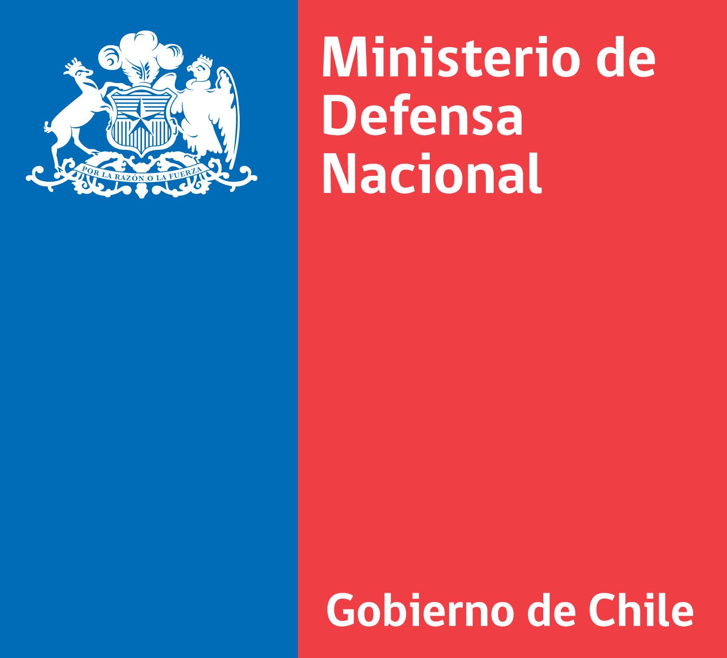 Logo del Ministerio de la Defensa Nacional del Gobierno de Chile